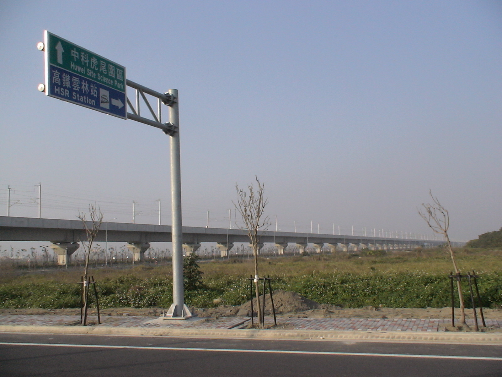 臺灣高鐵雲林車站預定地。